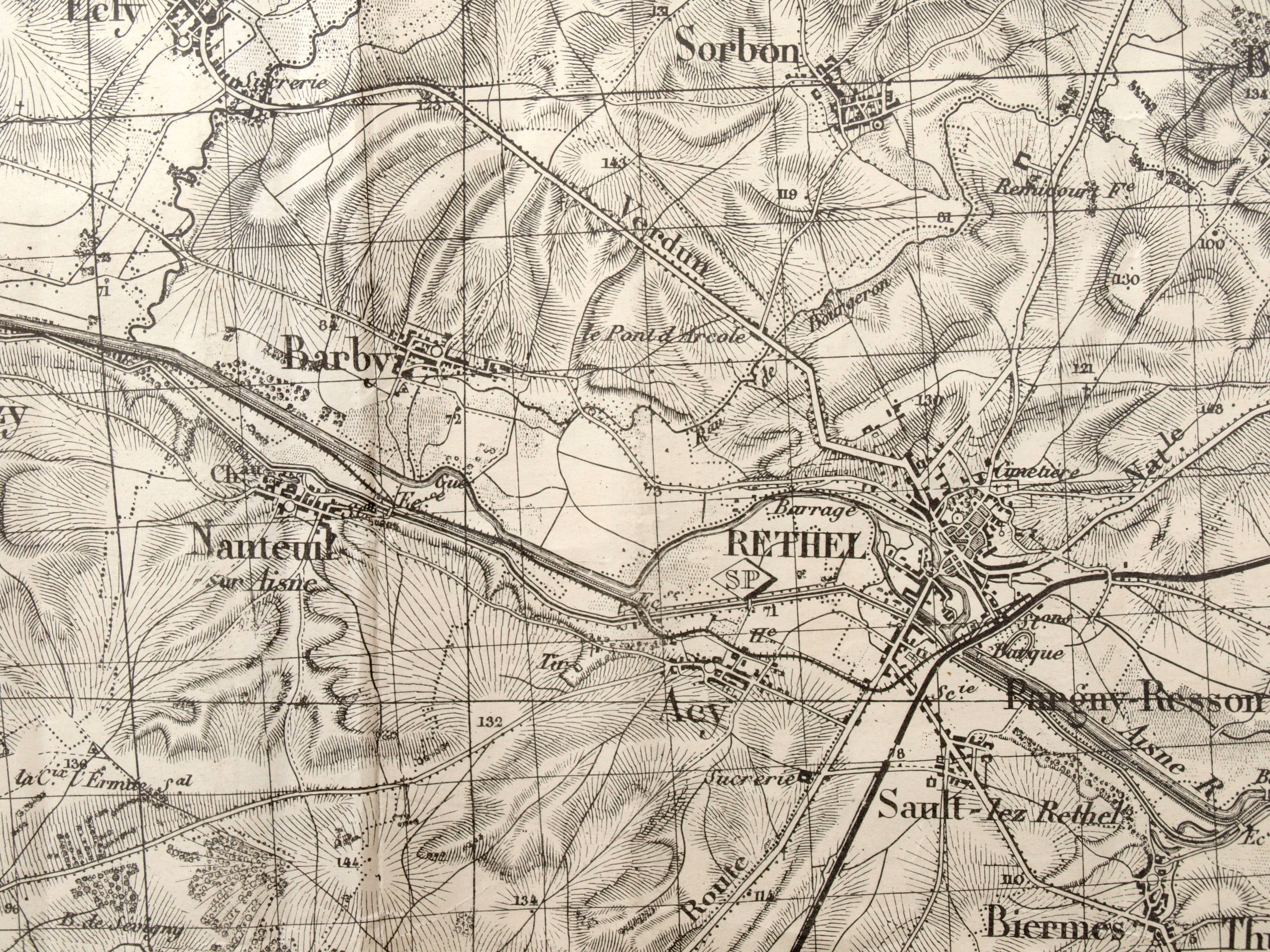 Carte de Rethel (Ardennes, France) et de ses proches environs vers 1930-1935